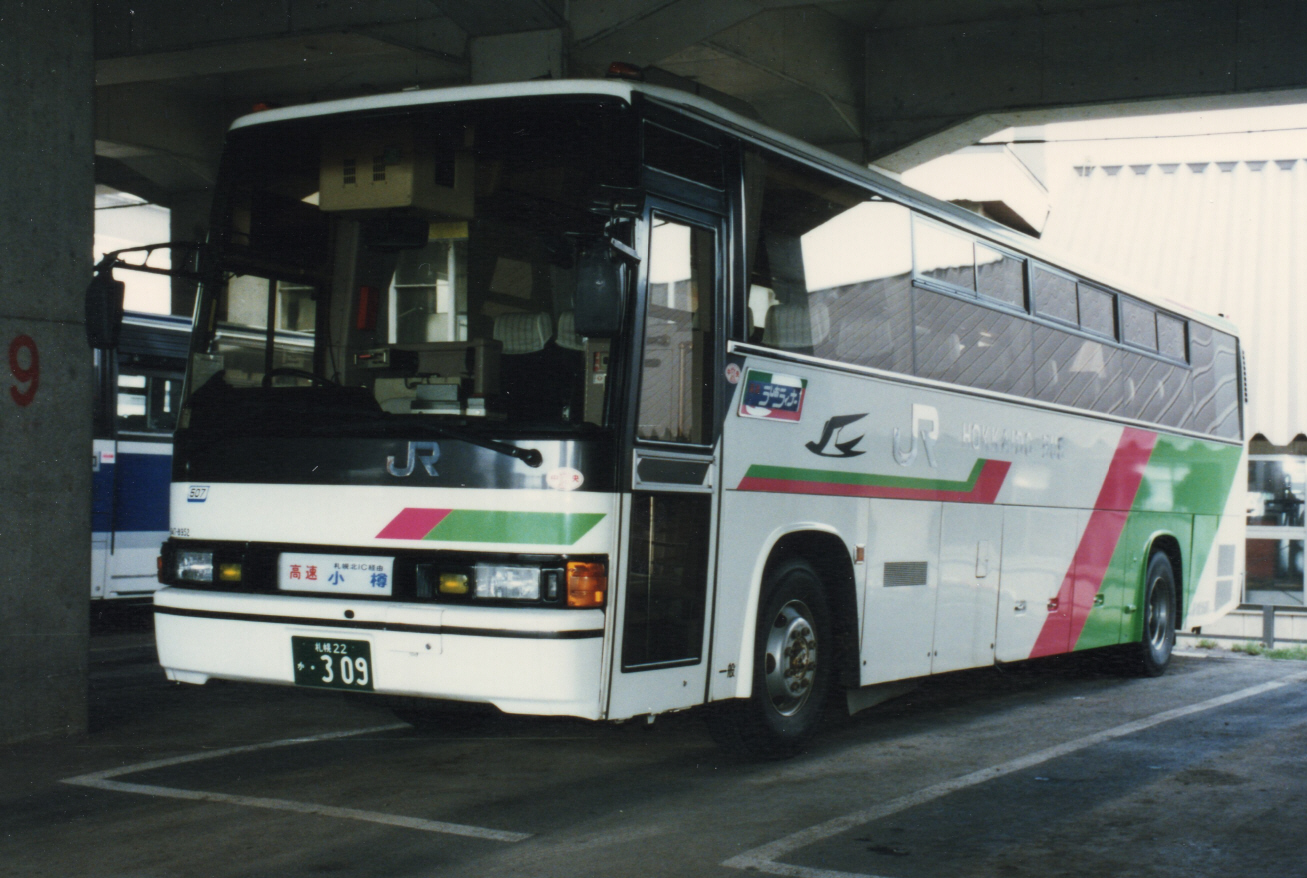 ＪＲ北海道バス時代 うしおライナー 札幌中央営業所にて、許可を得て撮影